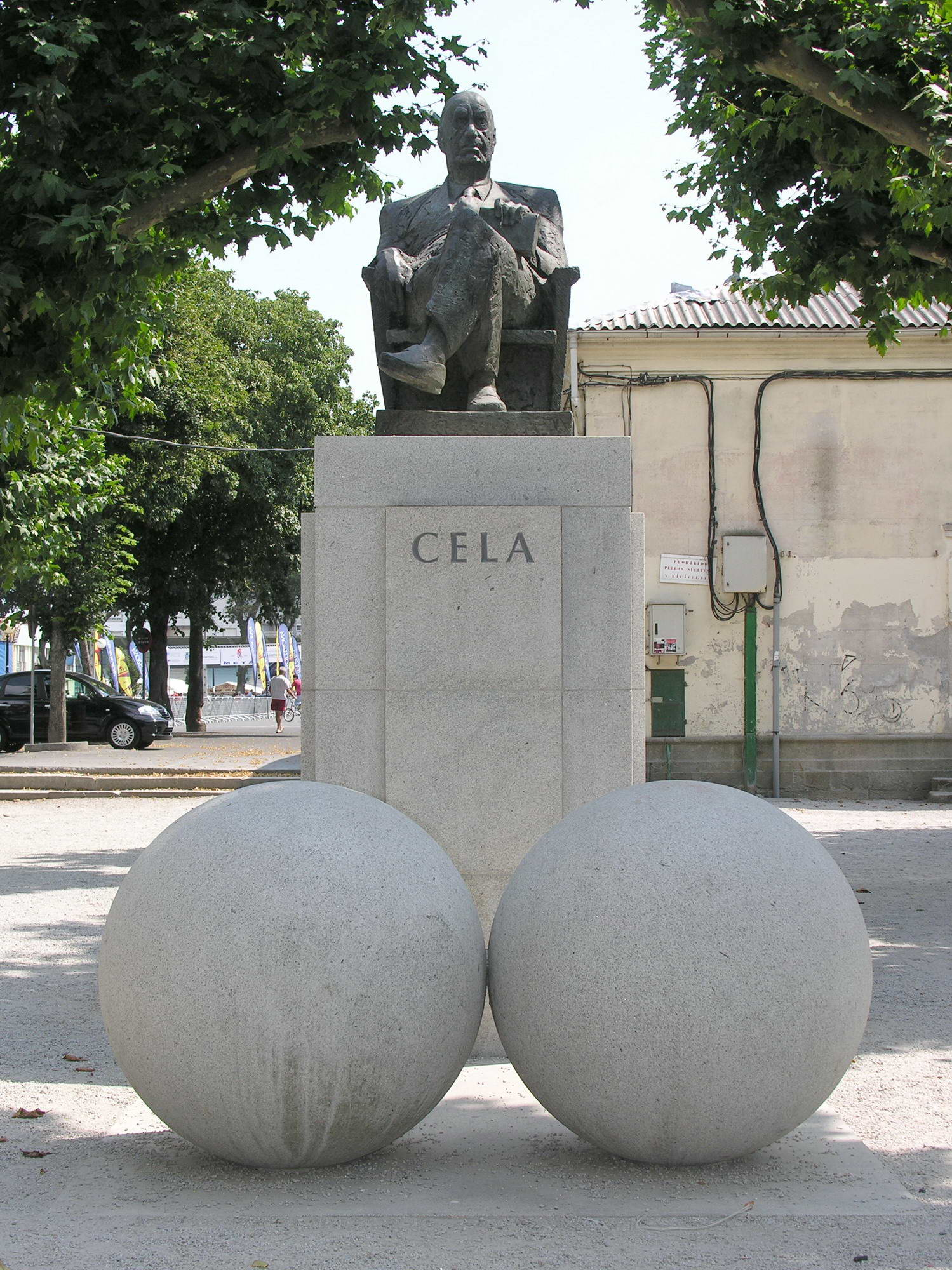 Camilo Jose Cela, Padrón, Galicia Publish by= Luis Miguel Bugallo Sánchez.